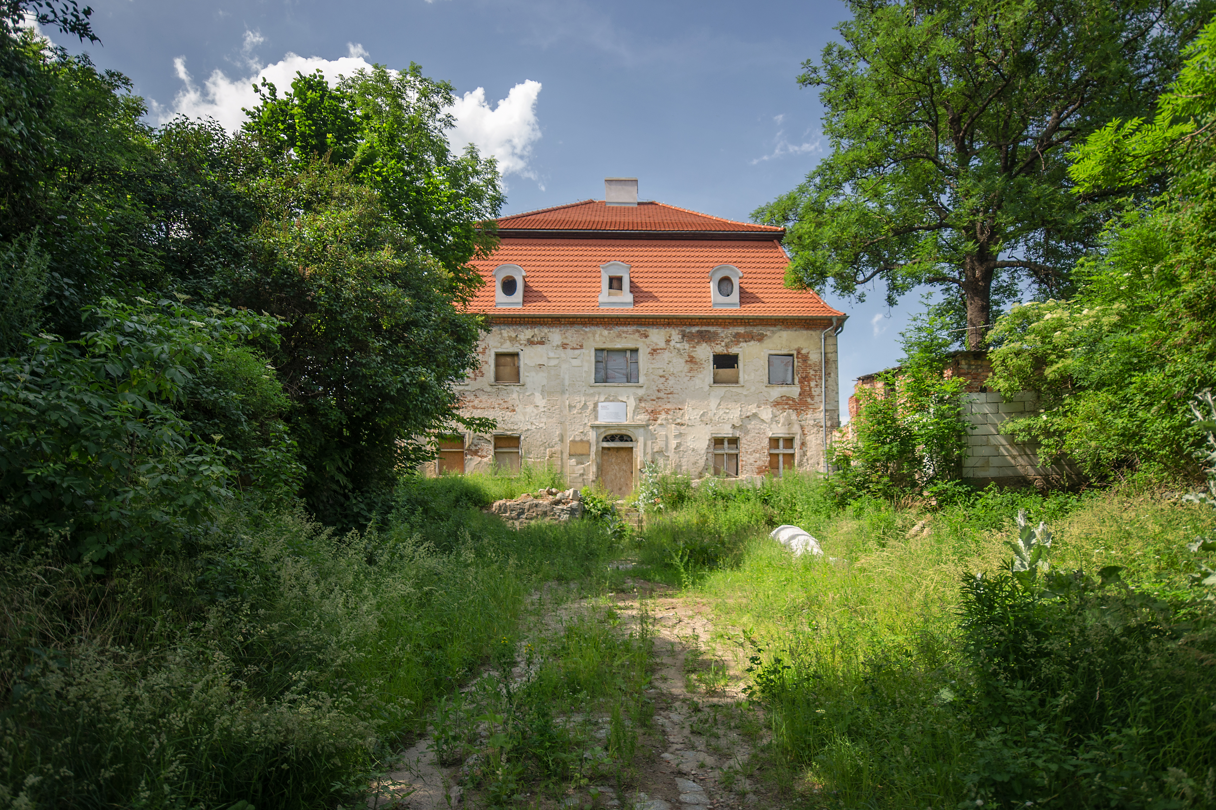 Księginice Małe, pastorówka, ob. dom mieszkalny, XVIII, XX